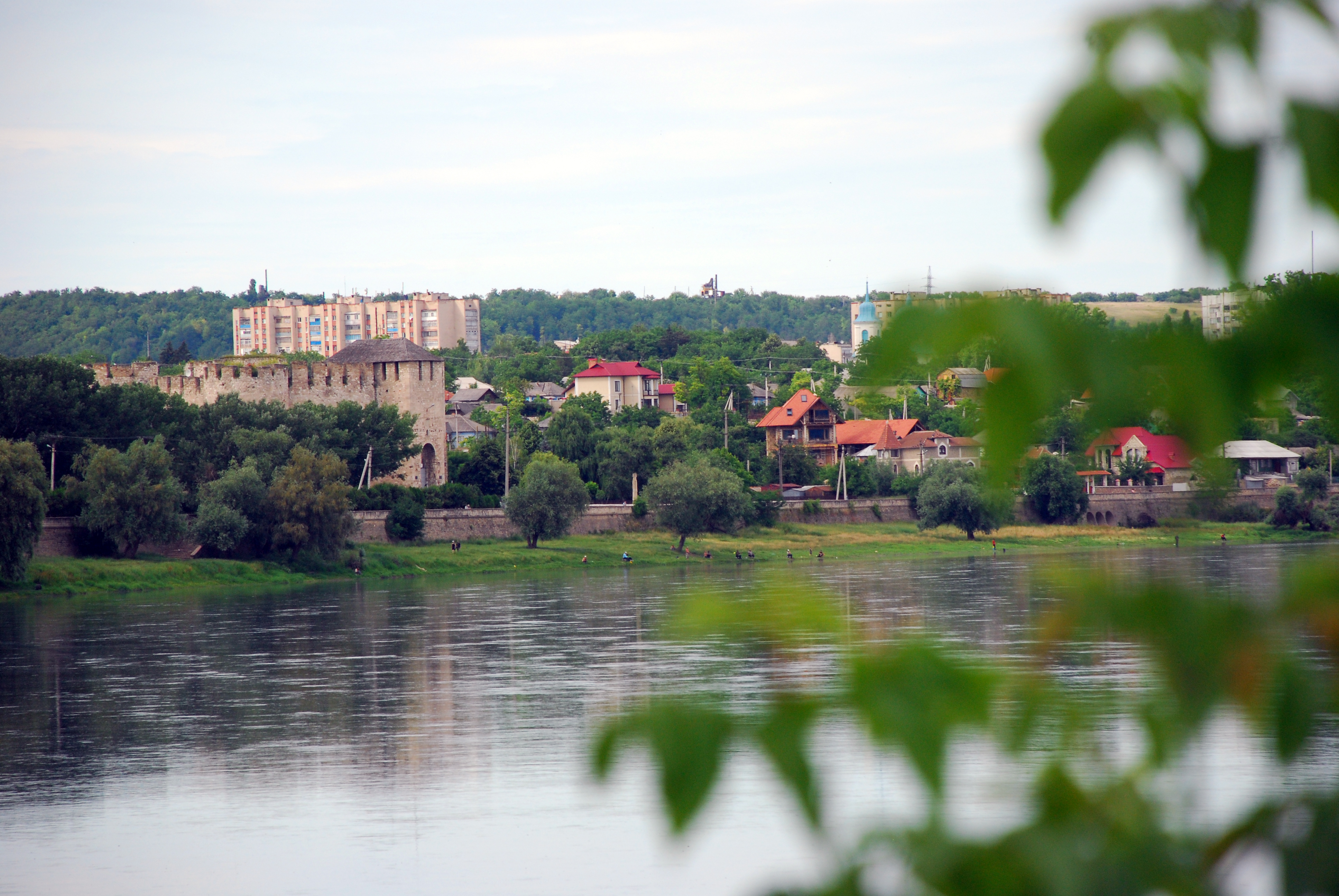 Fortăreaţa din Soroca se evidenţiază dintre celelalte cetăţi româneşti, prin faptul că intrarea principală este păzită de către flancuri, are un sistem concentric de apărare, iar rotunjimea o aduce aproape de perfecţiune.